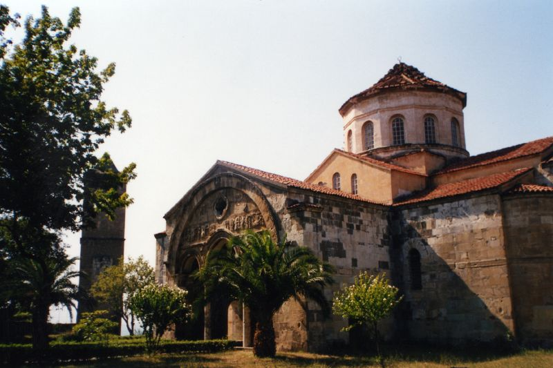 Aya Sofia in Trabzon